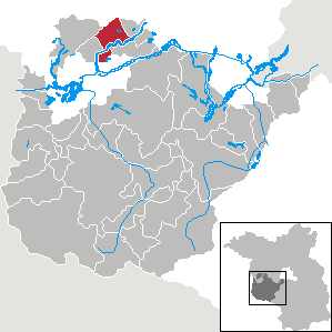 Beetzseeheide in Brandenburg (Country) - District Potsdam-Mittelmark